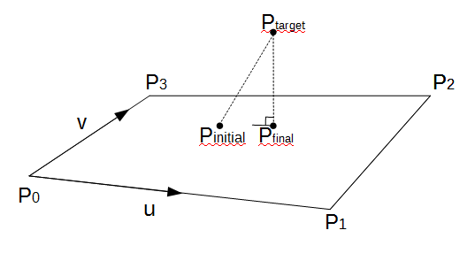 Projecting point on a surface